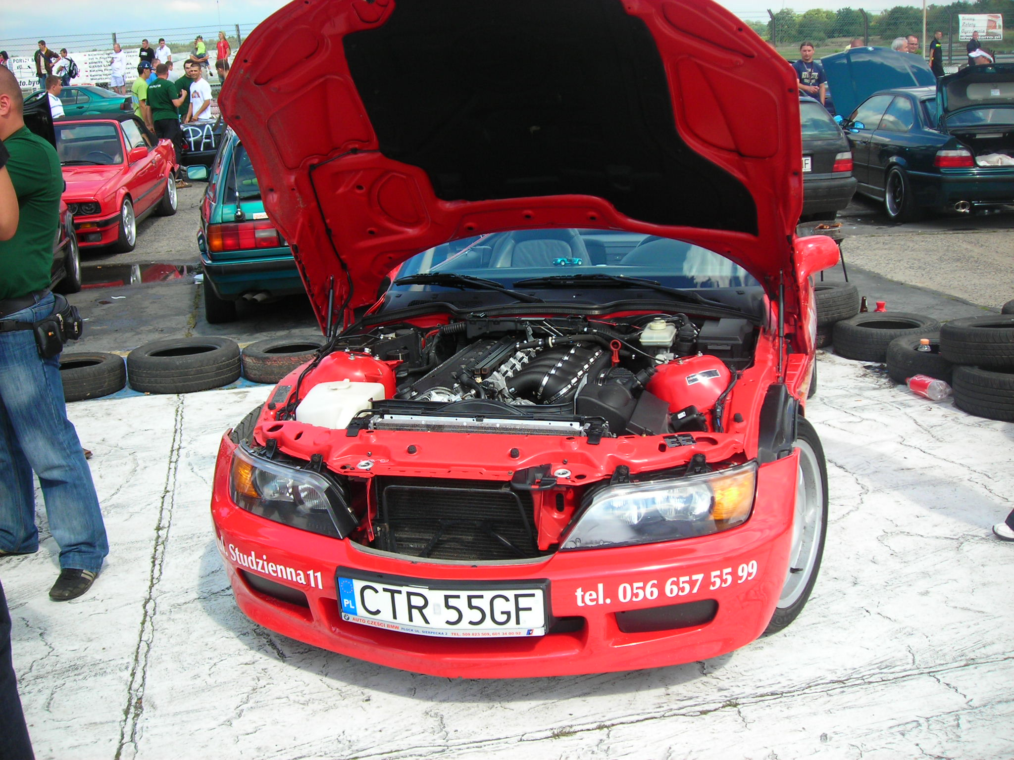 BMW Z3 M Roadster. silnik S52 3,2l. Zlot BMW M Power Club w Toruniu.